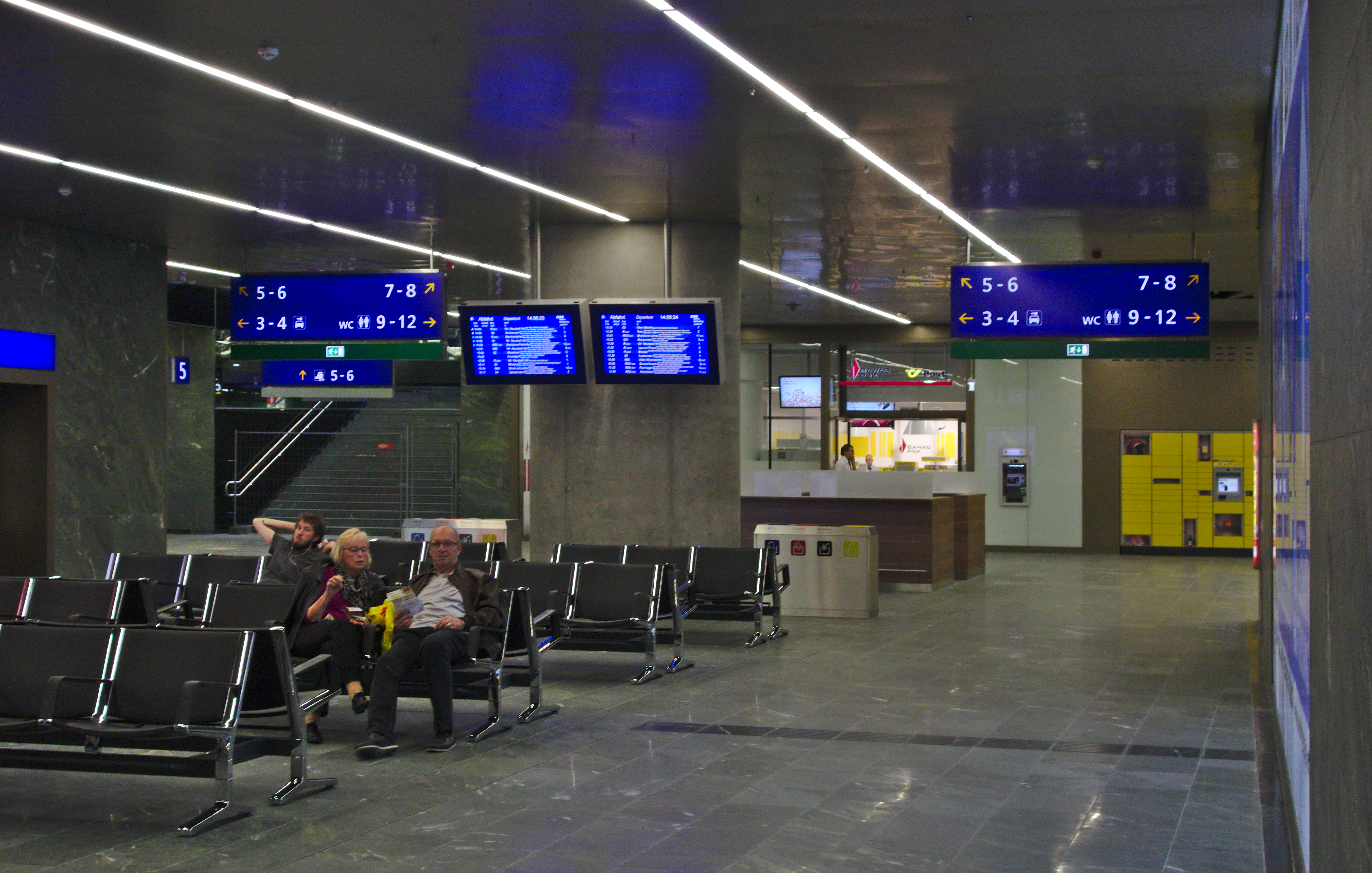 Wien Hauptbahnhof